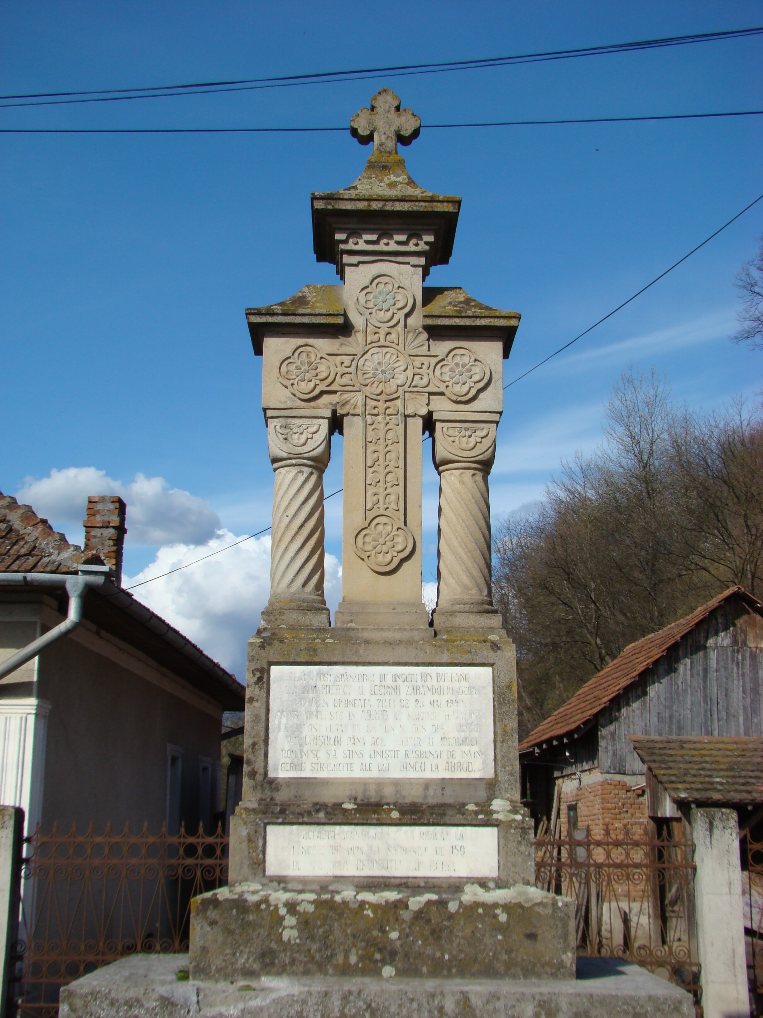 Troiţa lui Ioan Buteanu, strada Iosăşel; sat GURAHONŢ